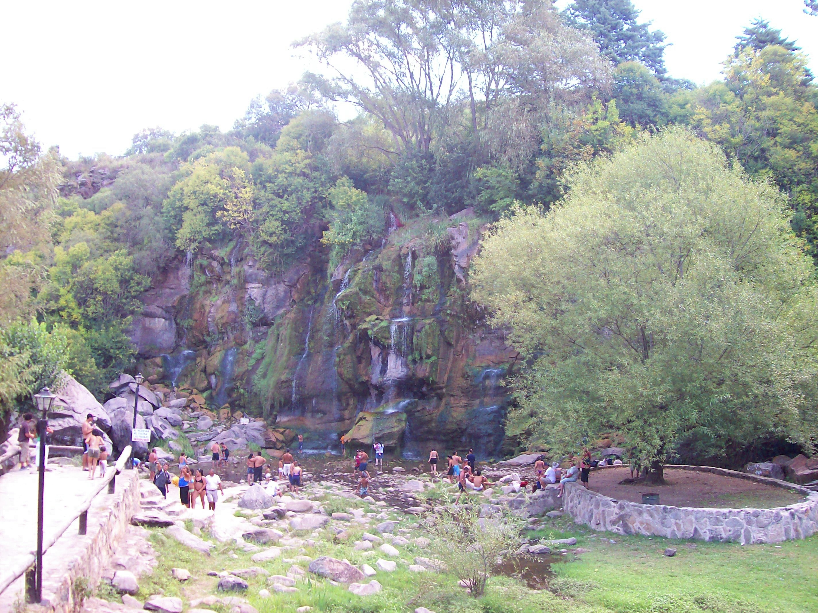 Balneario "Siete Cascadas", junto al Dique La Falda, en la ciudad homónima, pcia. de Córdoba, Argentina.